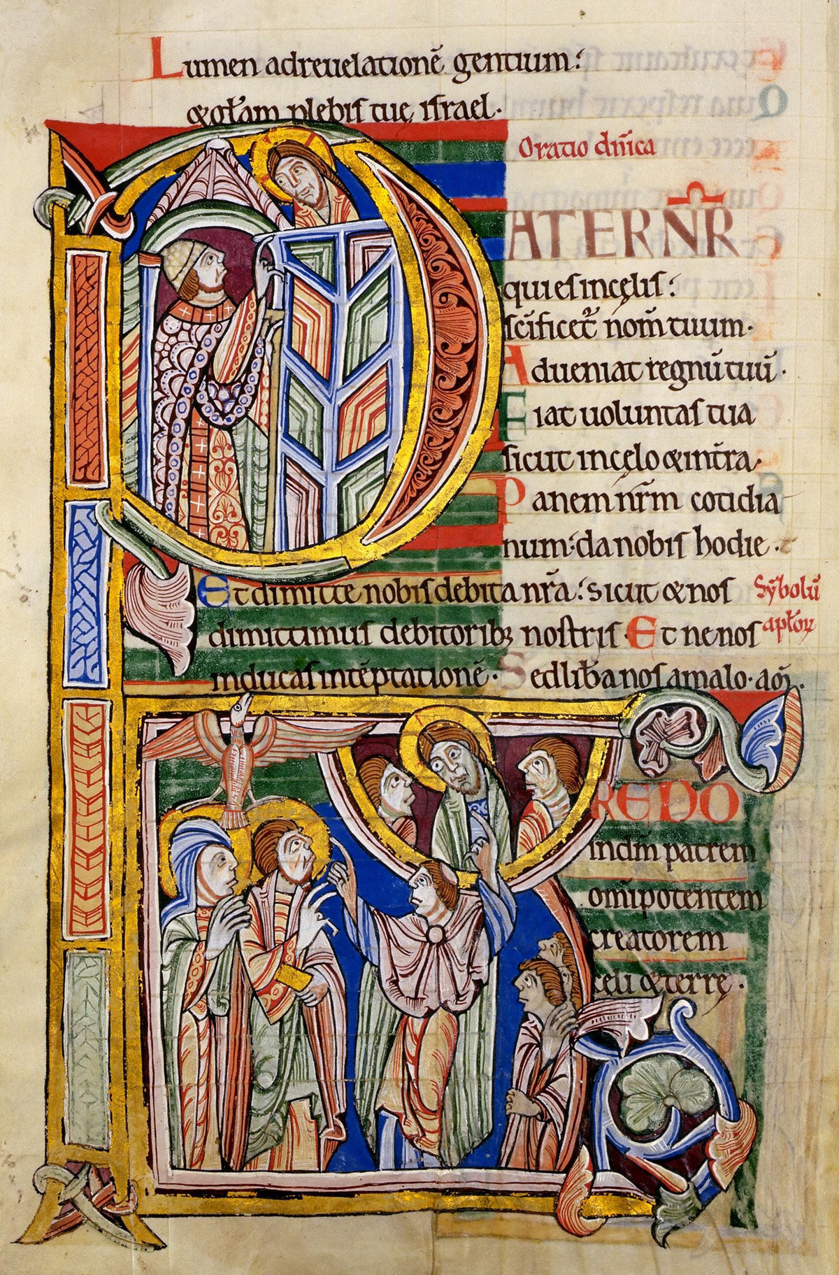 Vaterunser, Initial P. In: Albani-Psalter